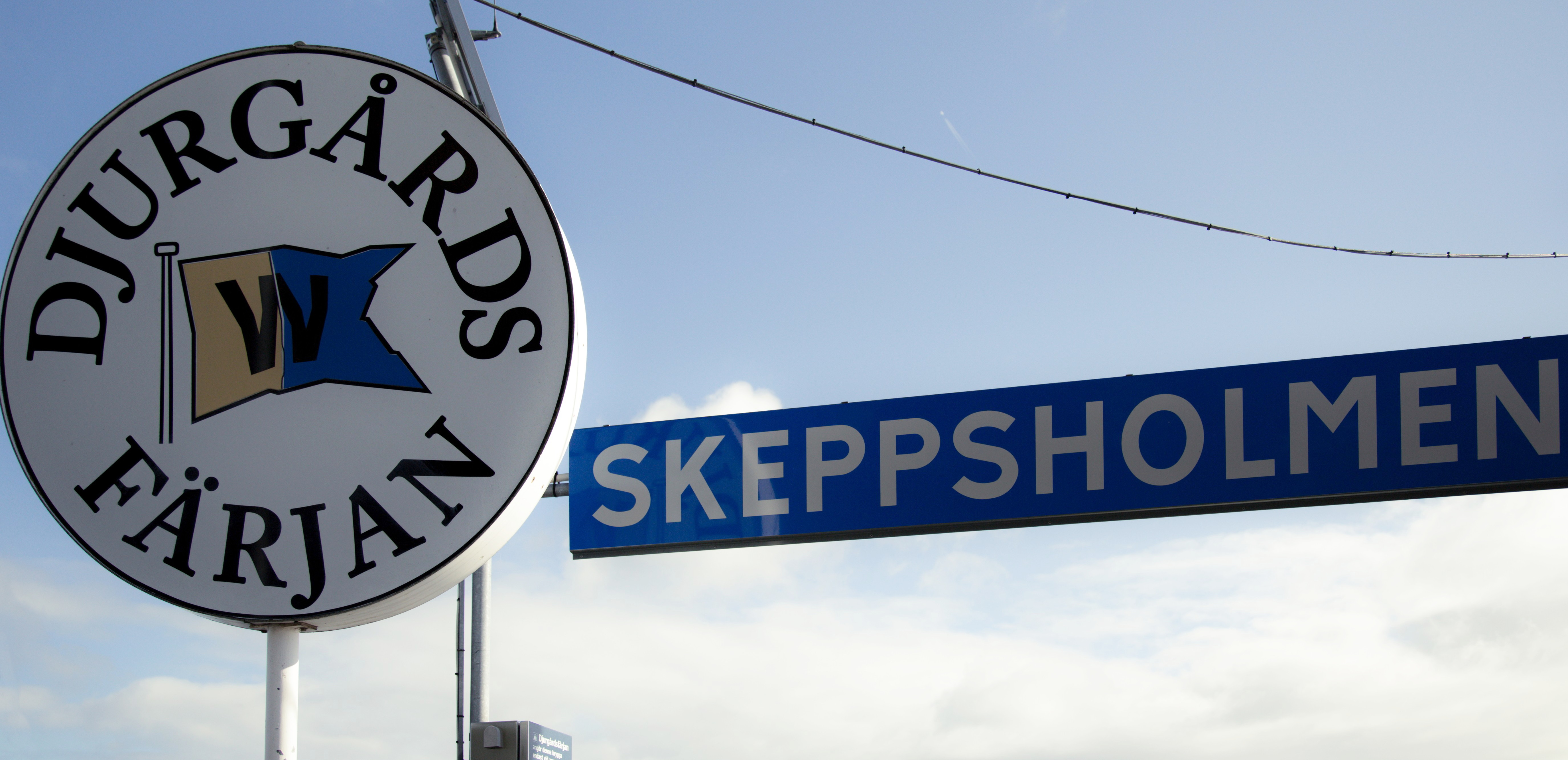 Stockholm, Sweden Licensing